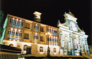 Ecuador-Loja-Iglesia_y_Convento_de_San_Sebastian photography by myself